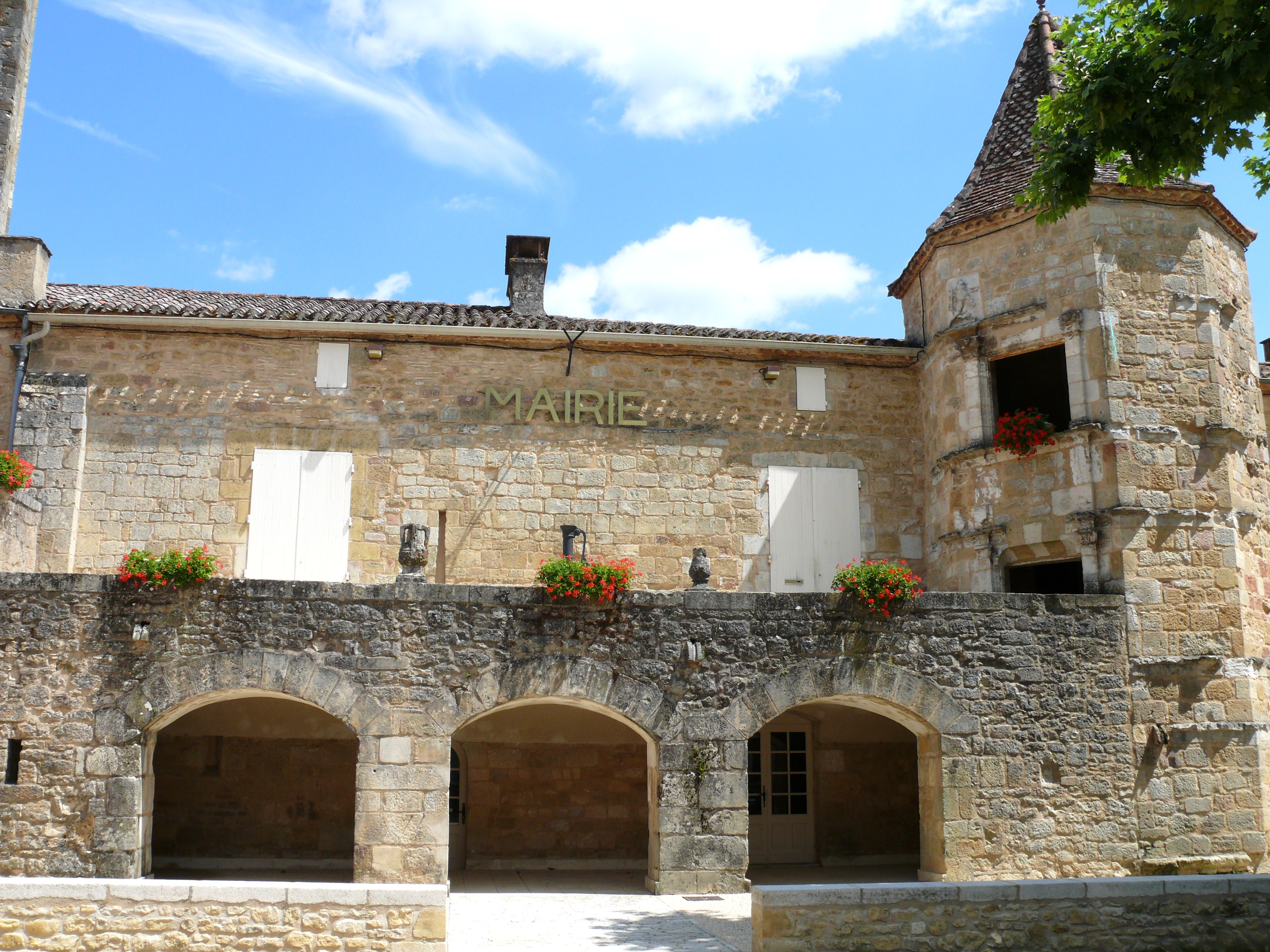 Saint-Front-sur-Lémance - Mairie